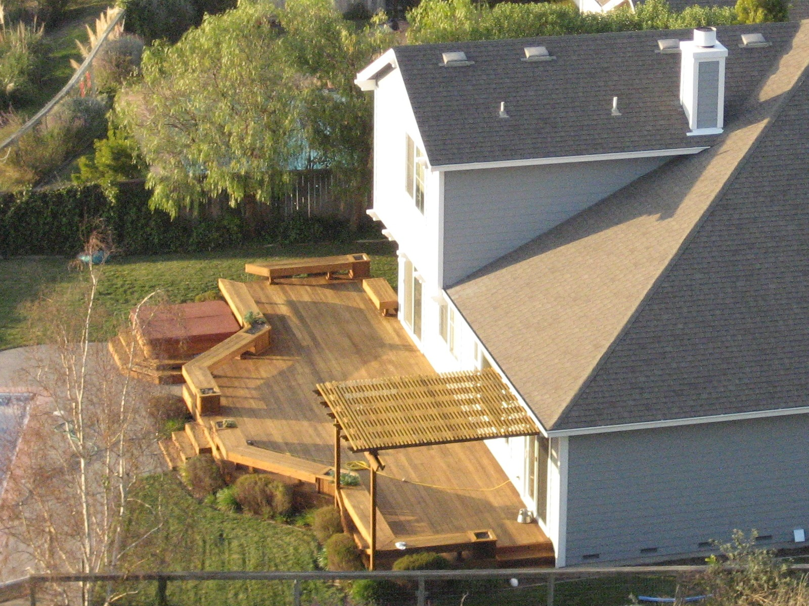 A backyard deck